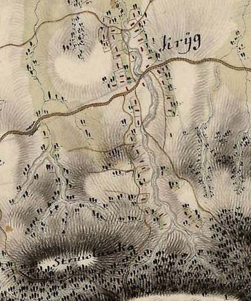 Kryg na mapie Josephinische Landesaufnahme (1763-1787), jako wieś łańcuchówka (Waldhufendorf)